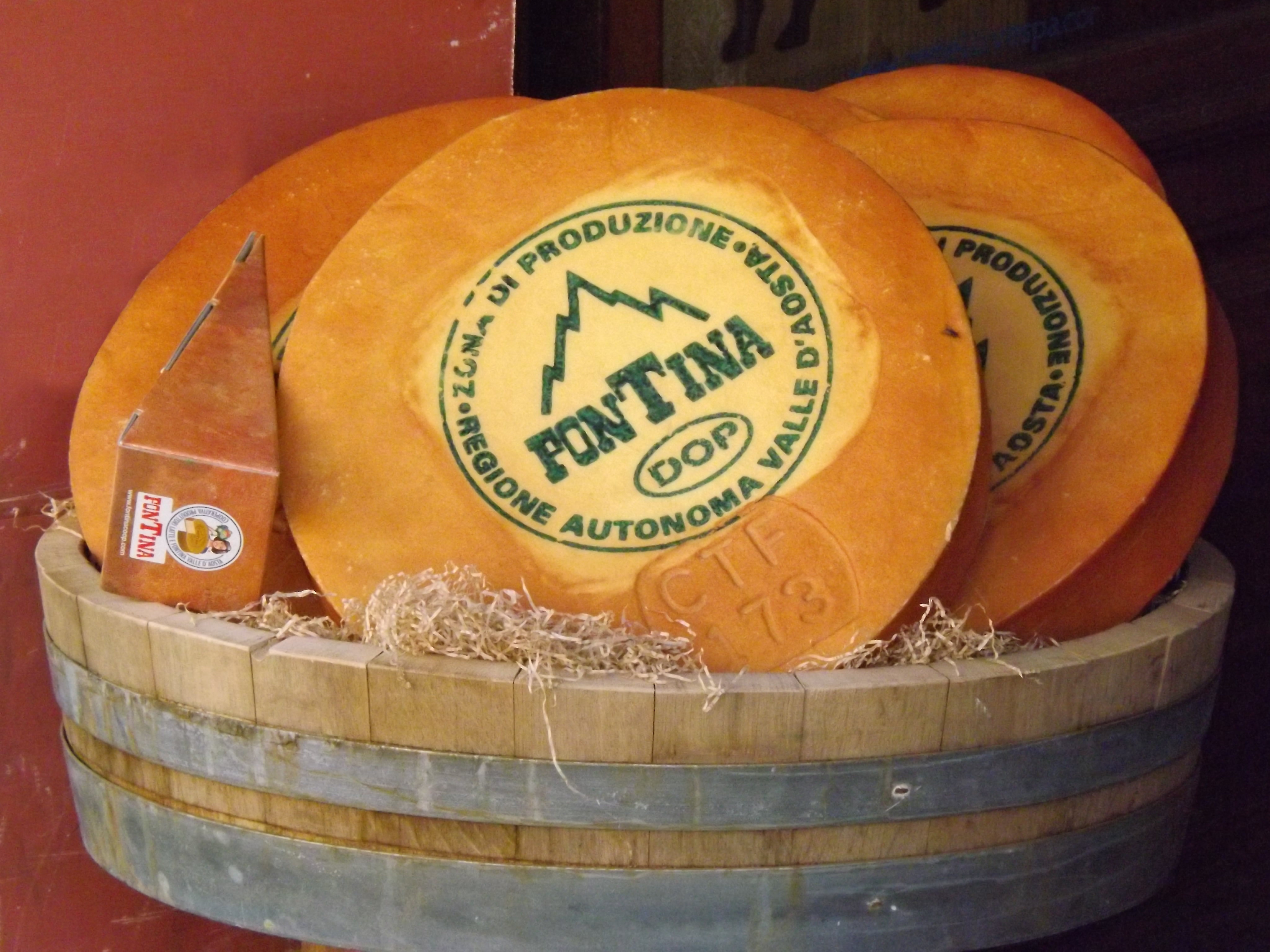 Forme di fontina, tipico formaggio della Valle d'Aosta